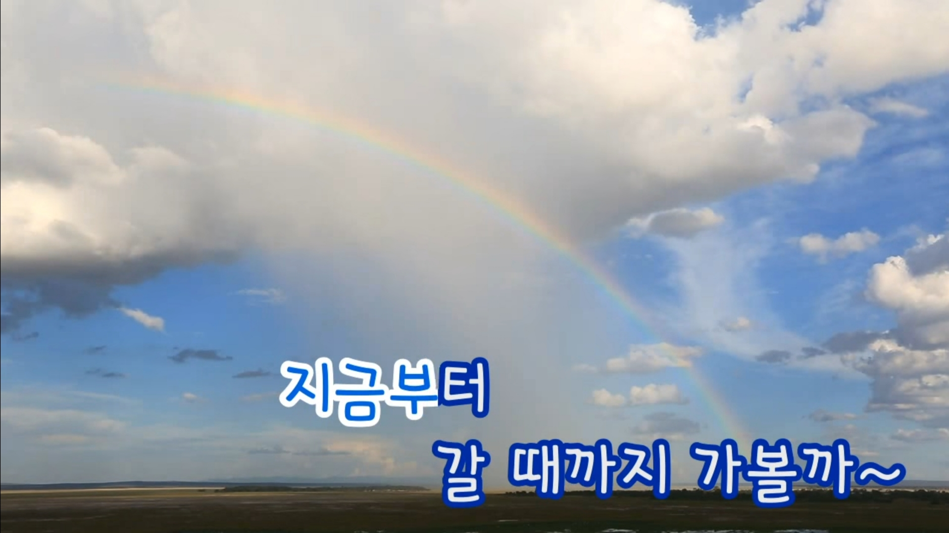 유튜브 tj미디어 싸이 강남스타일 화면의 일부